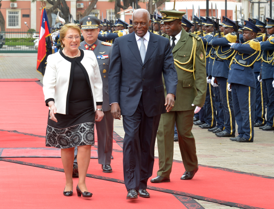 La Presidenta de Chile, Michelle Bachelet, llegó hasta el Palacio Presidencial de Angola, acompañada del mandatario de ese país, José Eduardo dos Santos.